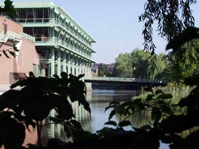 Rathaus Bocholt Copyright (c) Michael Weidemann; Kopieren, Verbreiten und/oder Modifizieren ist unter den Bedingungen der GNU Free Documentation License, veröffentlicht von der Free Software Foundation, erlaubt.